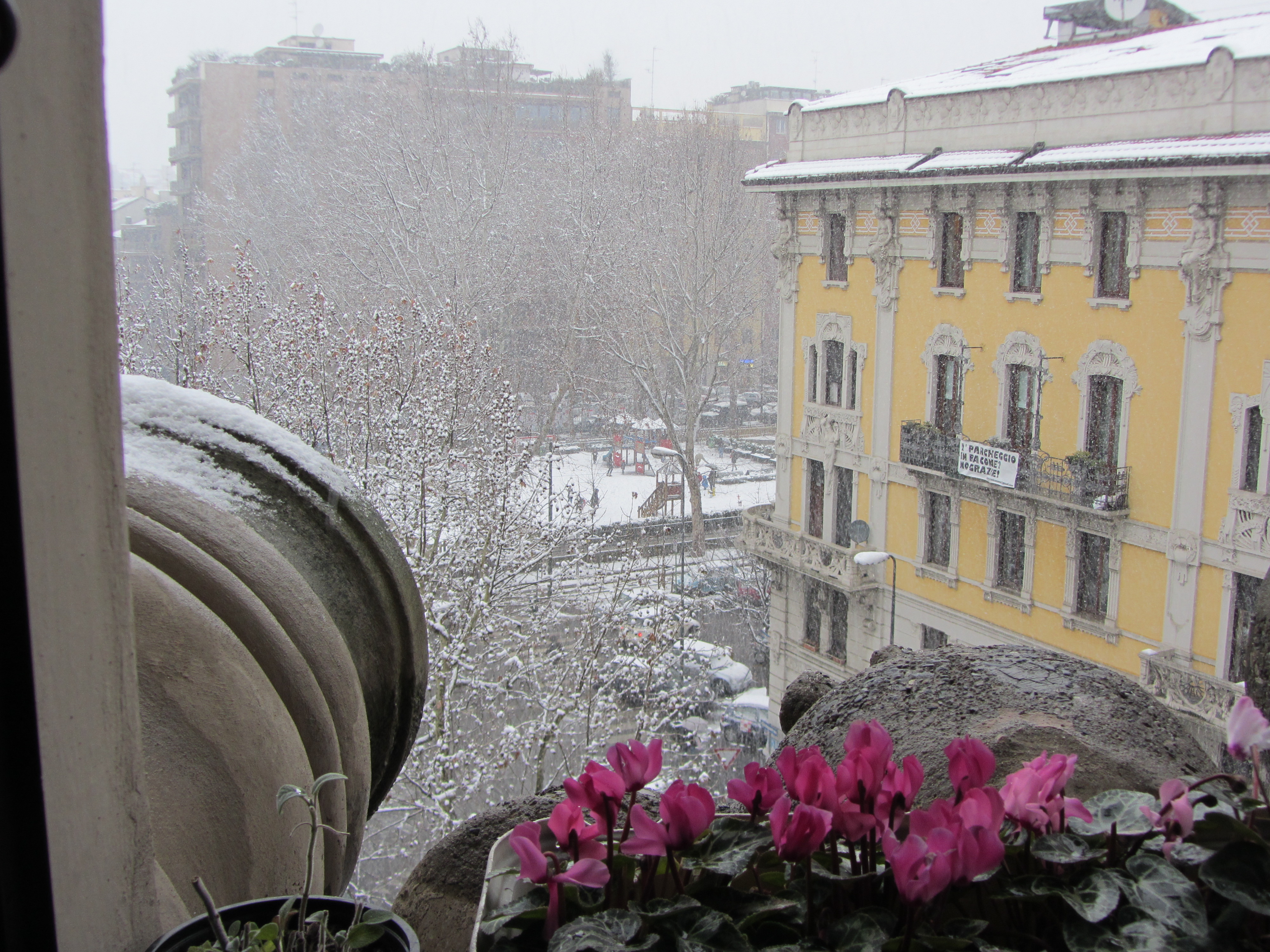 nevicata febbraio 2013 a Milano